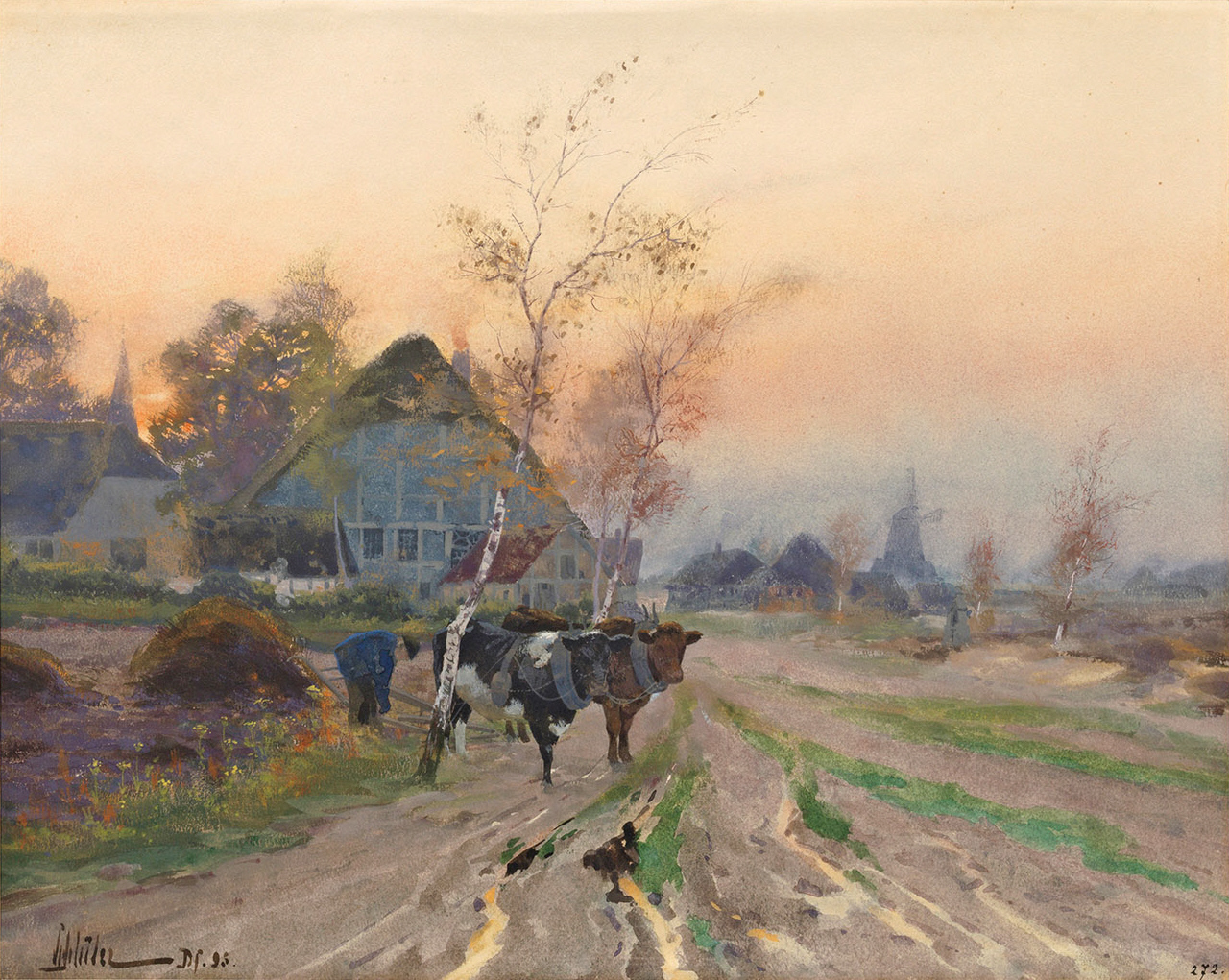 Niederrheinische Dorfstraße mit Ochsenpflug im Abendrot. Aquarell und Gouache auf Papier. Links unten signiert und datiert (18)95 mit Ortsangabe Düsseldorf. 34 cm x 43,5 cm